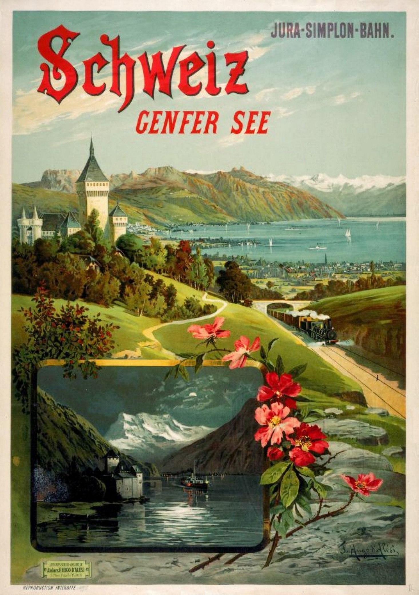 Die Jura–Simplon-Bahn (JS) war vor der Verstaatlichung eine der grossen Privatbahn-Gesellschaften der Schweiz. Sie entstand 1890/91 durch die Fusion der wichtigsten Westschweizer Bahnen Suisse-Occidentale–Simplon, Pont–Vallorbe und Jura–Bern–Luzern.